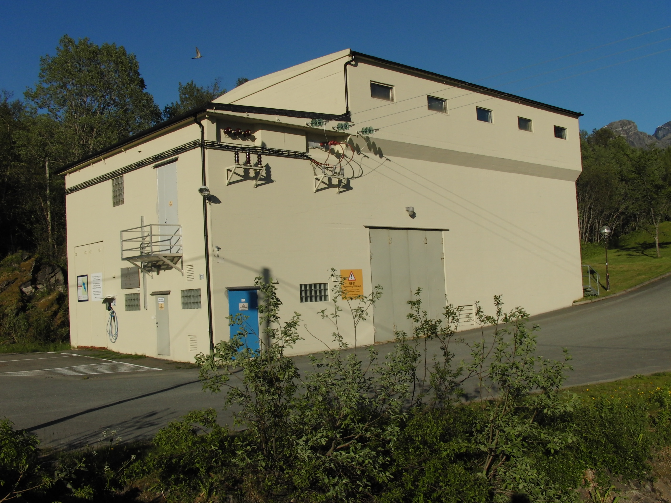 Gamle Helleren kraftverk